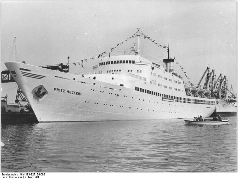 Zentralbild Burmeister 2.5.1961 Urlauberschiff "Fritz Heckert" zur ersten Reise verabschiedet. Das in der DDR gebaute Urlauberschiff "Fritz Heckert" wurde am Nachmittag des 1. Mai am Kai des Wismarer Hafens von vielen hundert Einwohnern der Stadt und von den 1500 Gewinnern der Urlauberschiffs-Lotterie, die im Ostseebezirk ihre Ferien verleben, zur ersten Ostseerundreise verabschiedet. UBz. Die "Fritz Heckert" am Kai im Wismarer Hafen kurz vor dem Auslaufen.